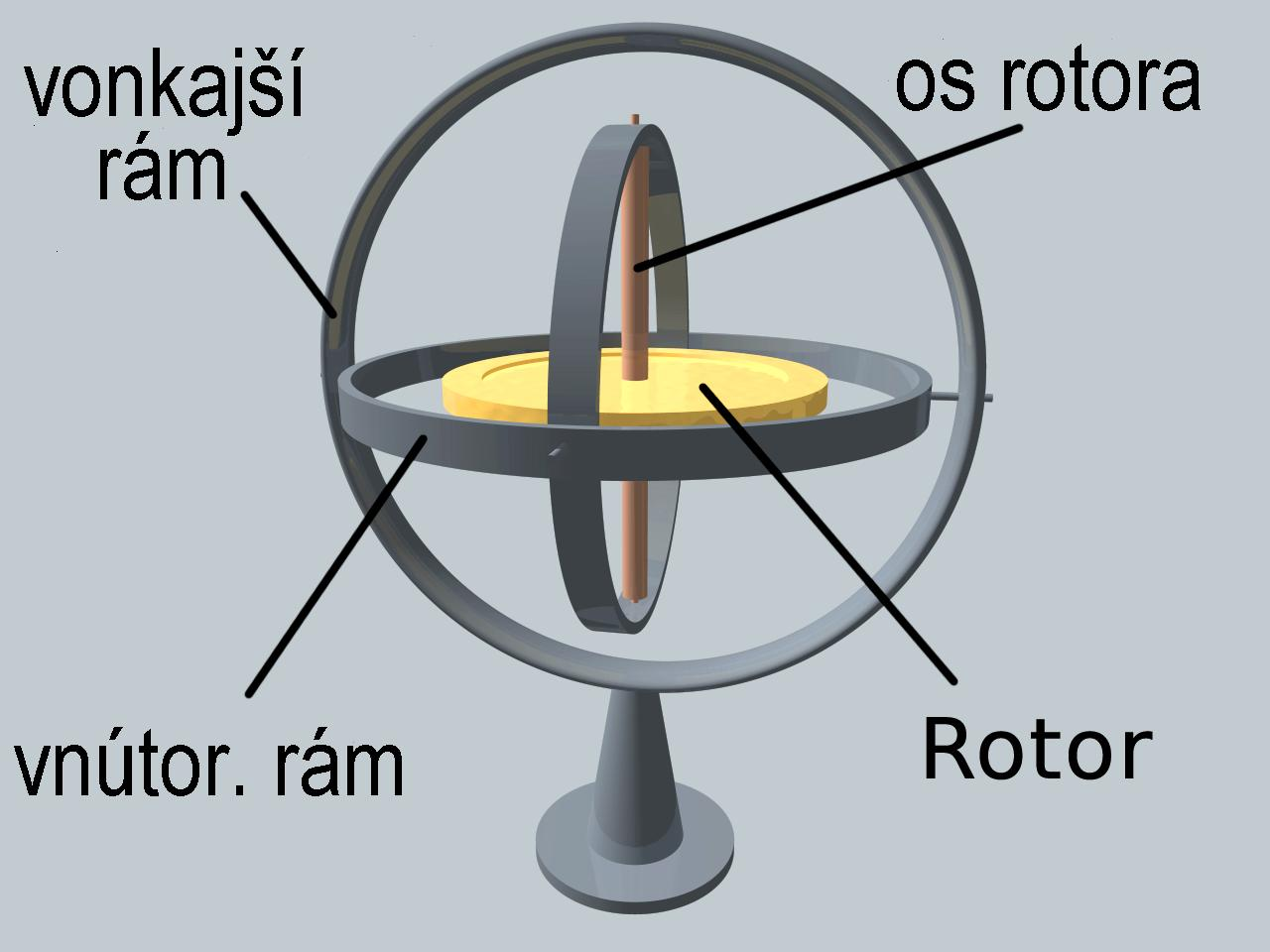 gyroskop 3 - dimensional, description - slovak